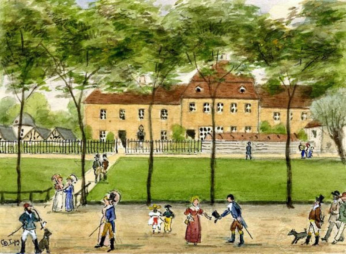 Der Kuchengarten in Leipzig zum Beginn des 19. Jahrhunderts